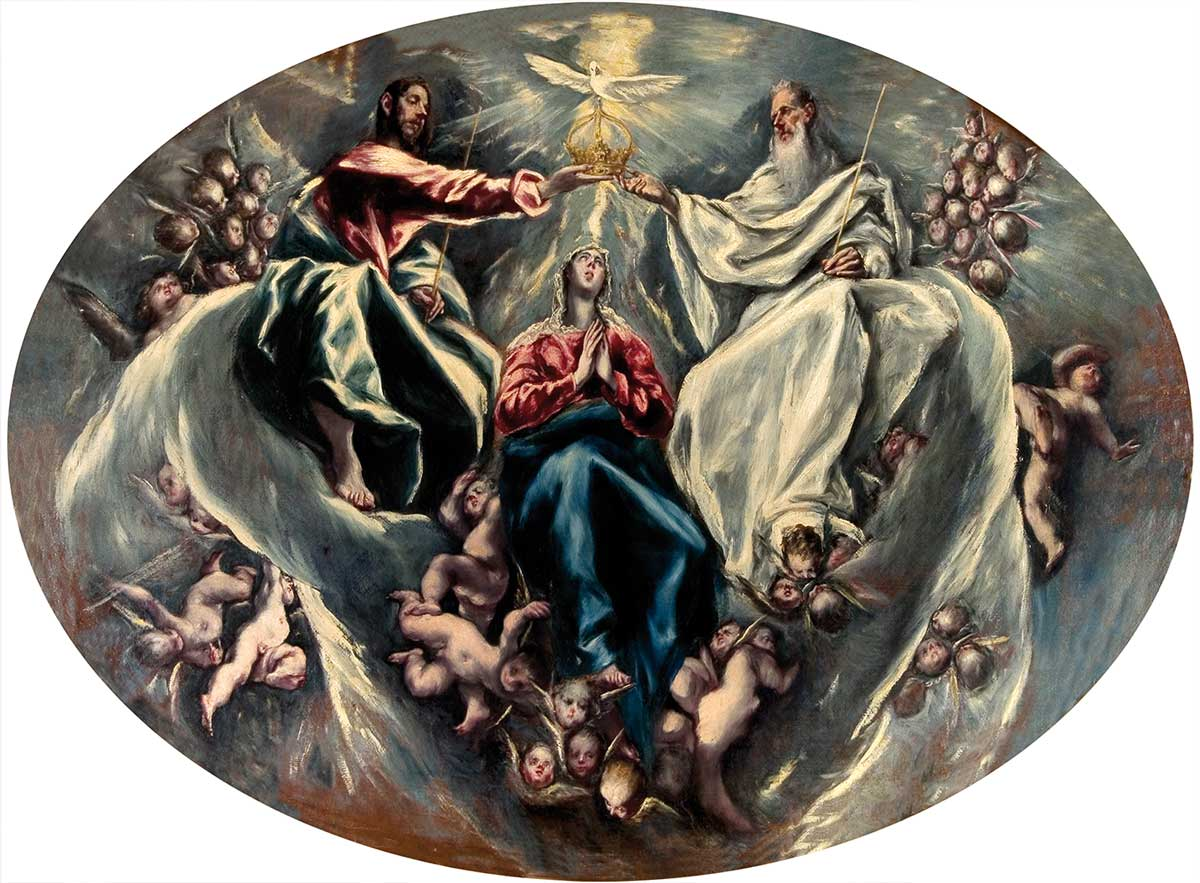 La obra representa la Coronación de la Virgen María, madre de Jesucristo, por los tres miembros de la Santísima Trinidad.